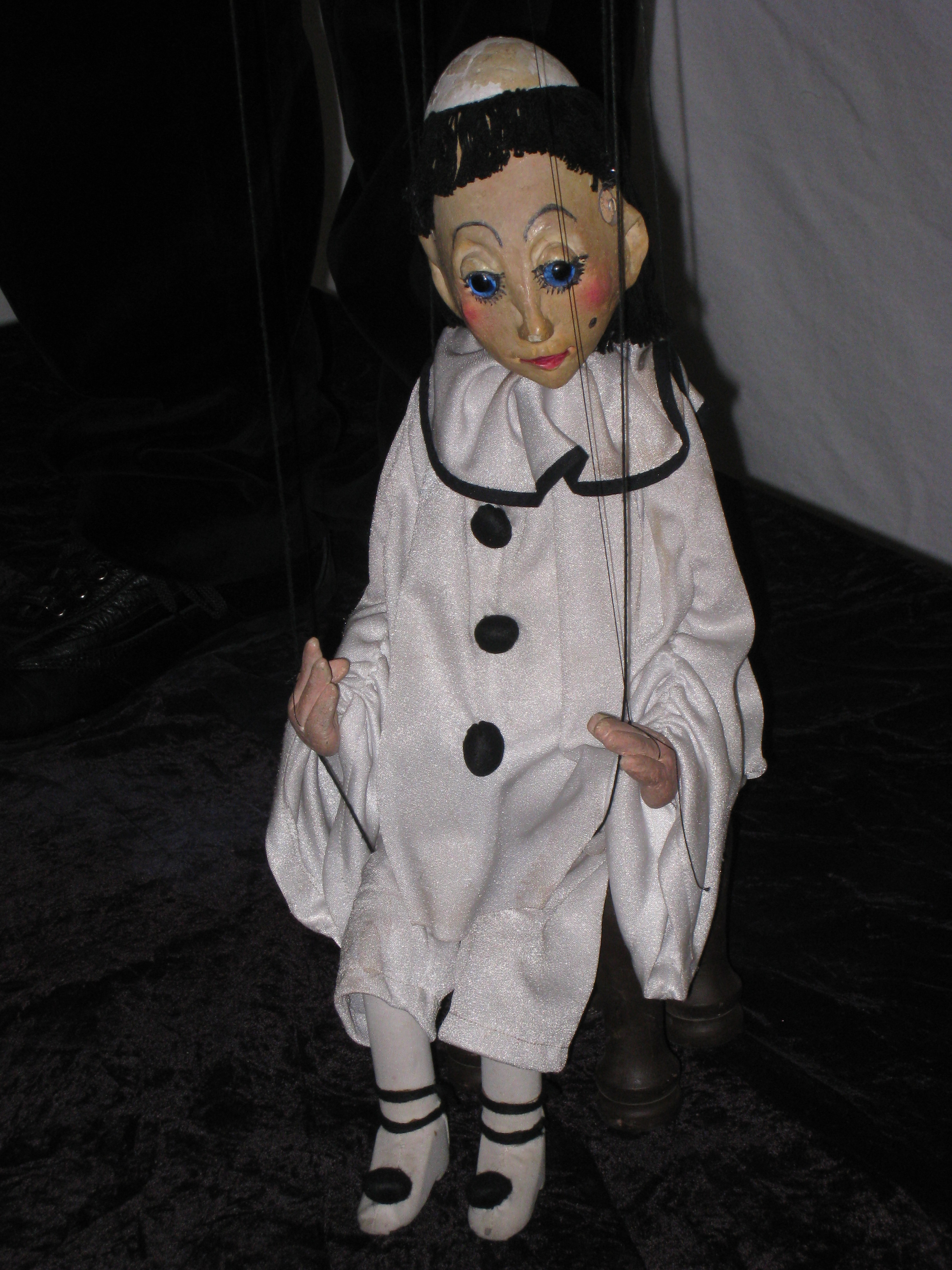 Pierrot als marinet